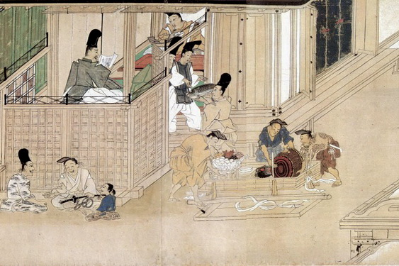 『松崎天神縁起』に描かれた裕福な受領の屋敷の侍廊。領地に課した様々な献納品が運び込まれている。